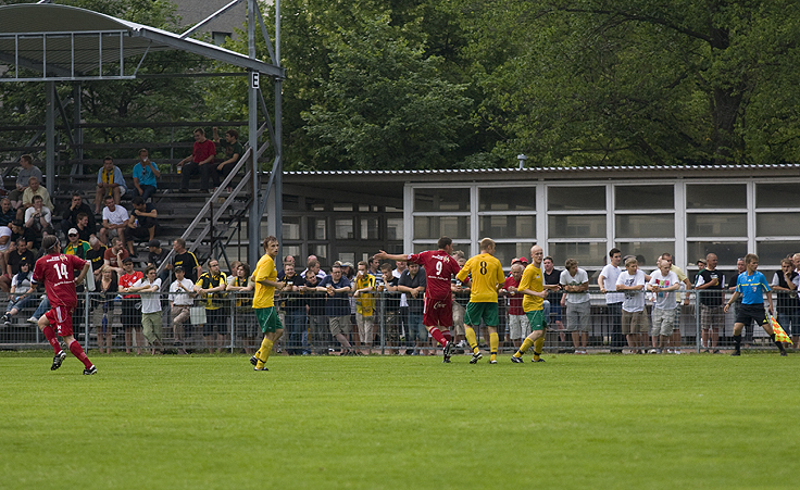 Ilveksen kannattajat heinäkuussa 2010